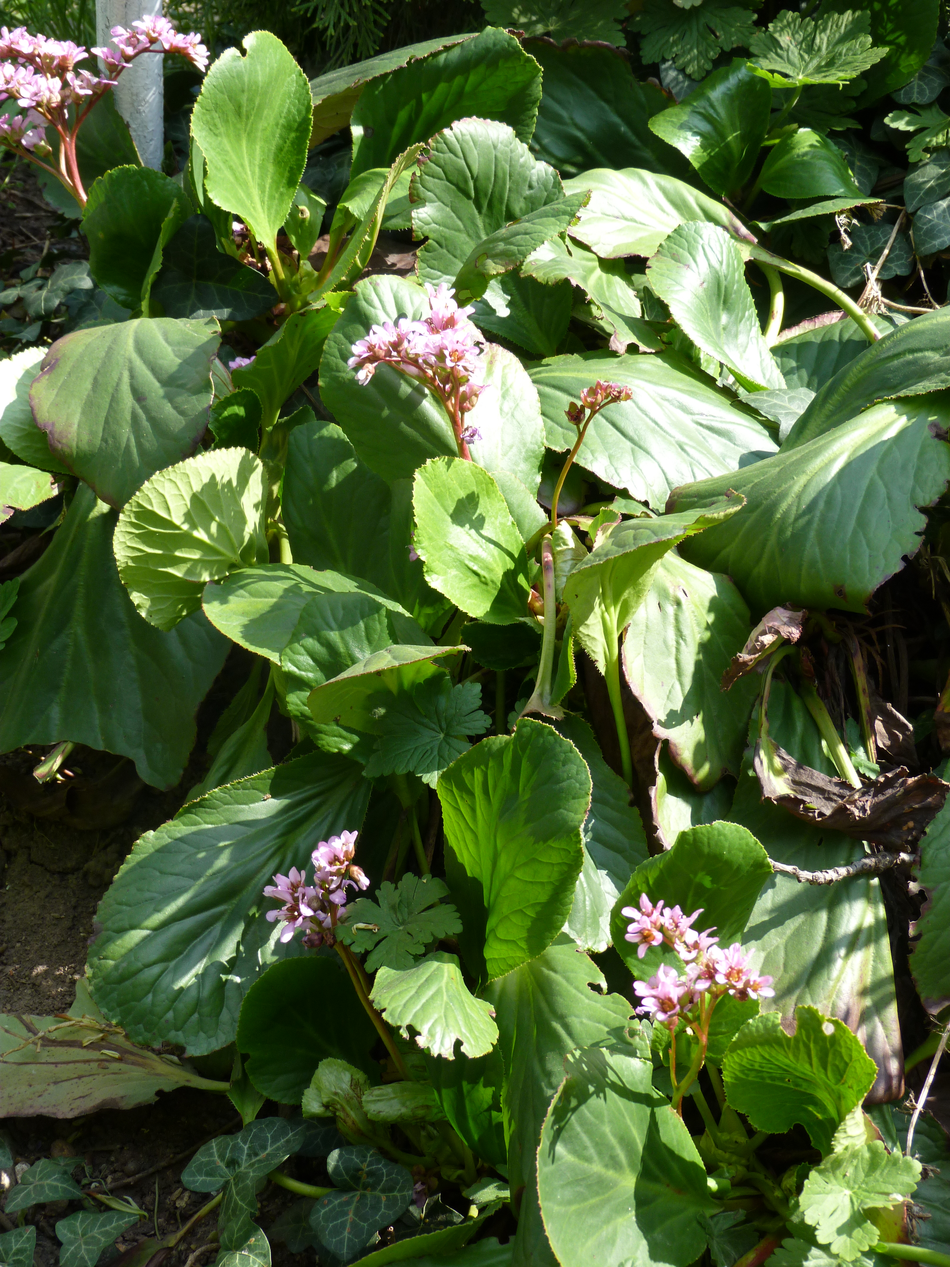 A felvétel 2013. április 23-án készült Budán. A sashegyi természetvédelmi területhez közeli kert. ©© Derzsi Elekes Andor, Budapest, 2015, Published in the Metapolisz DVD line. You are authorised to use this photo under Creative Commons – even for commercial, for profit purposes. The vid must be attributed to Derzsi Elekes Andor. All of the photos and vids in the Metapolisz DVD line are under Creative Commons and can be used even for commercial – for profit – purposes. Recommended Citation Derzsi Elekes Andor: Metapolisz DVD line